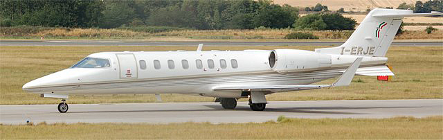 Eurojet Italia Learjet 40 LJ40